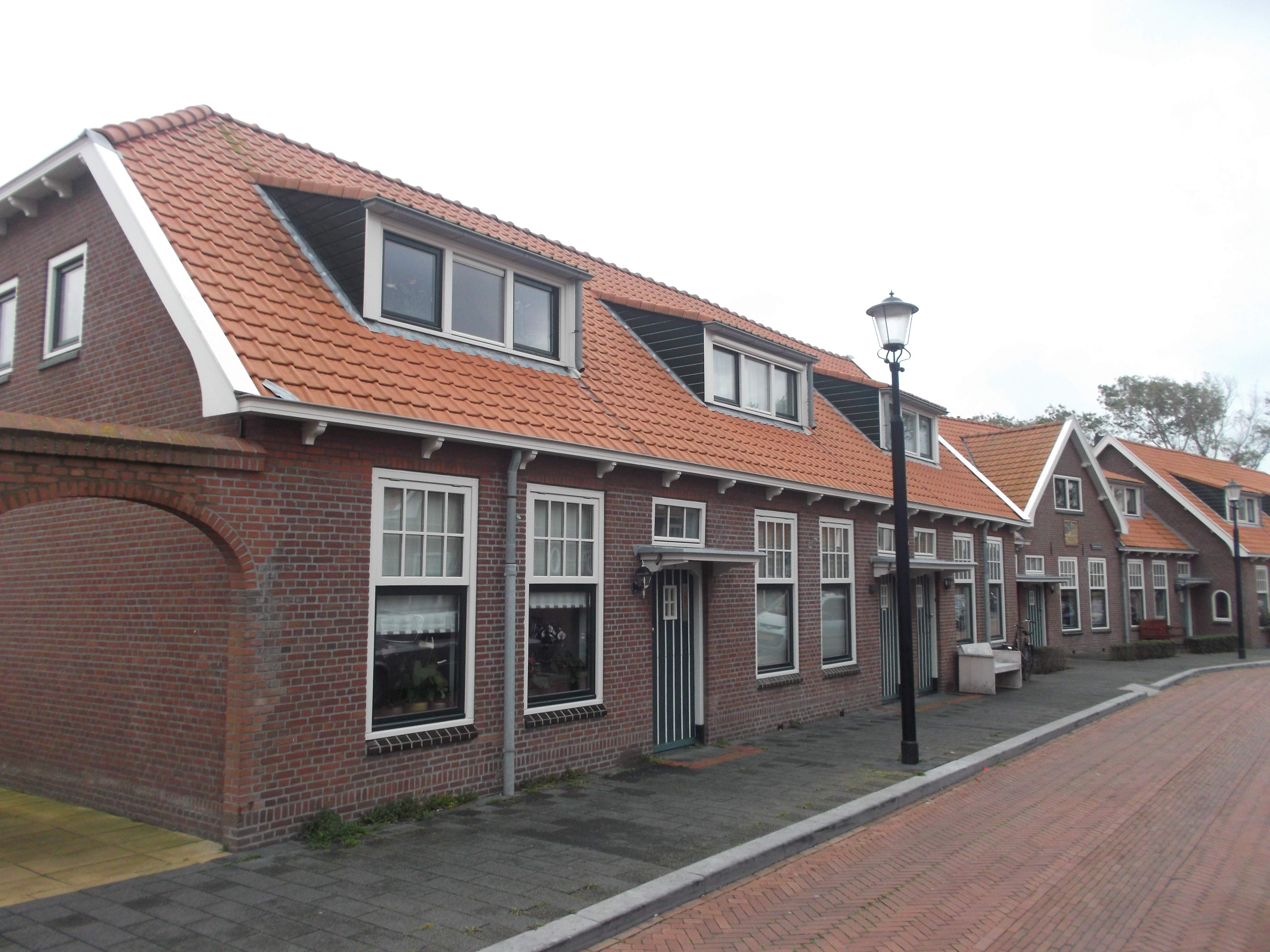 KZ 68